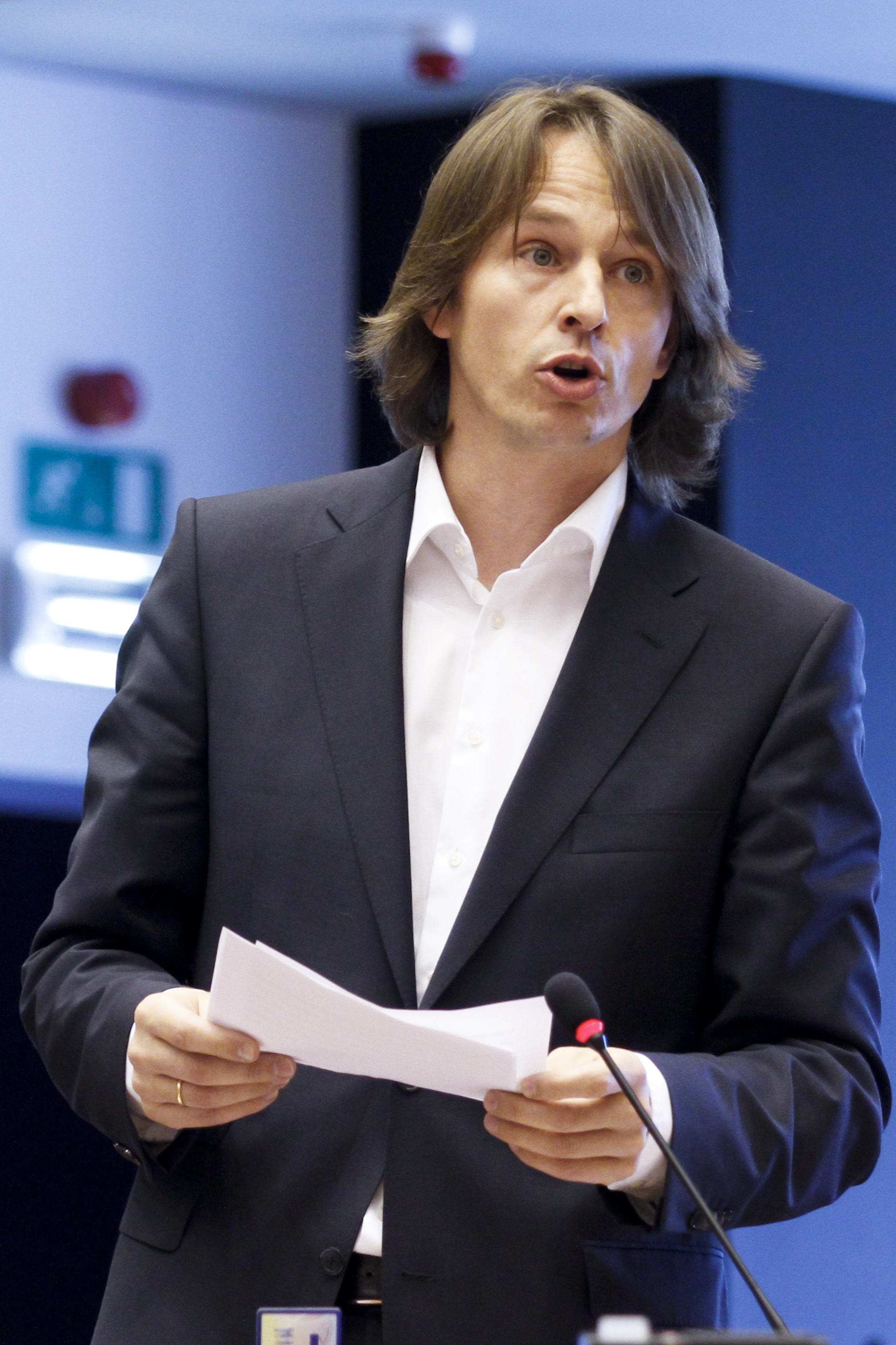 Edvard Kožušník, autor koncepce udělování Antibyrokratické ceny Michala Tošovského.